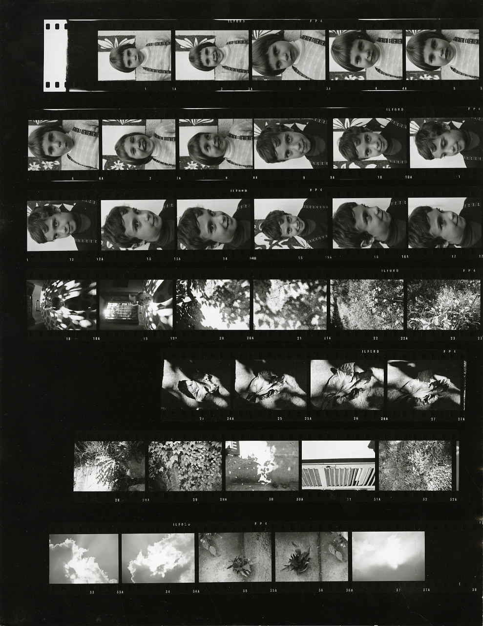 Serie fotografica : Livigno, 1975 / Paolo Monti. - Strisce: 3, Fotogrammi complessivi: 17 : Positivo b/n, gelatina bromuro d'argento/ carta, provino a contatto da pellicola 35 mm. - ((Al verso: "2807". Confronta scheda 2807L01-17. - N.B. Possibile sottoserie (1): . - 9-17 = Ritratto bambino. - Fonte: Agenda di Paolo Monti: Leica 1501-3000 Controllo numerazione (1950-1978), presso Archivio Paolo Monti